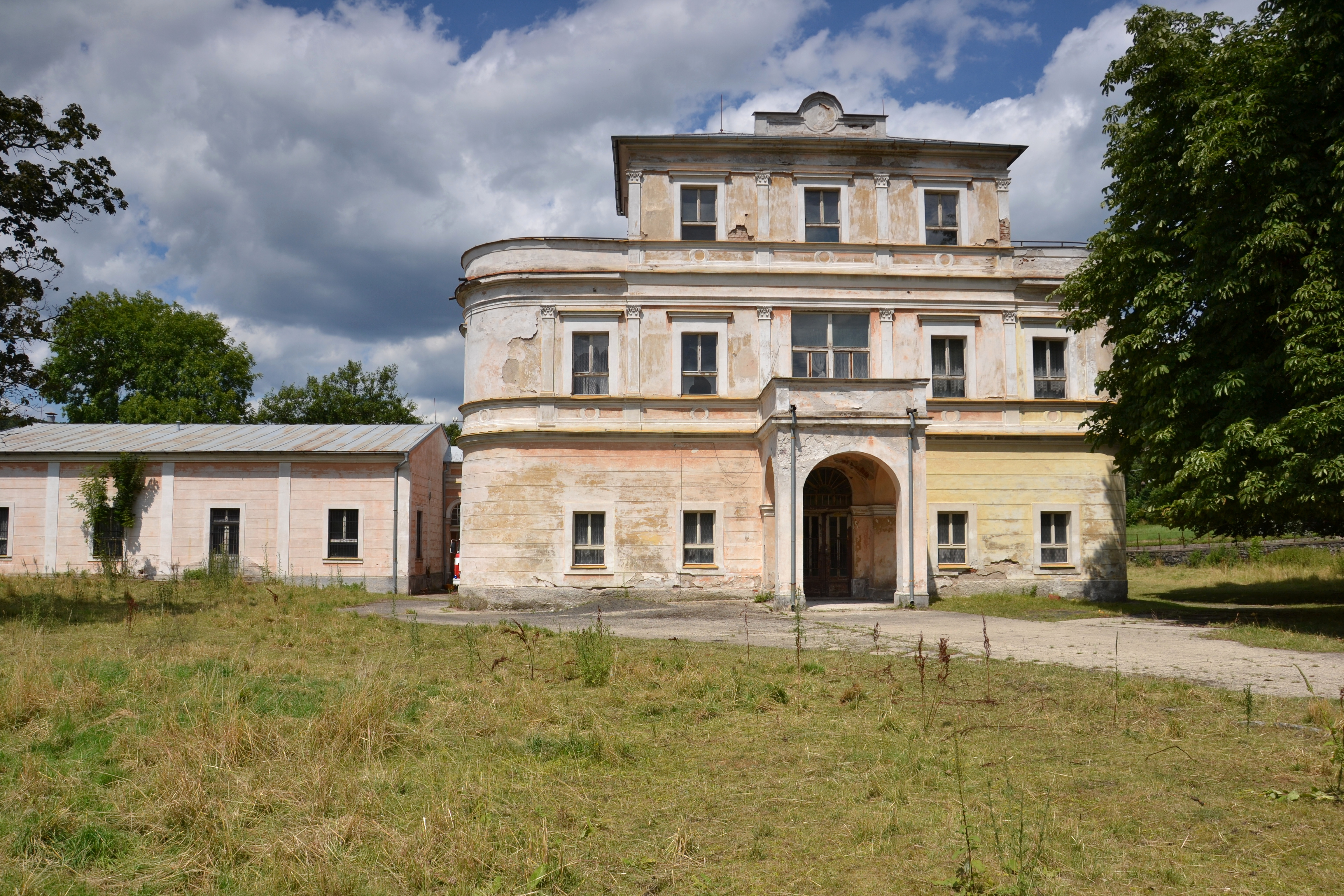 Zámek Velichov, Velichov 1, Velichov – průčelí zámku